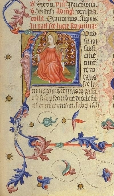 Brevier des Martin von Aragon, Ende 14. Jhndt.